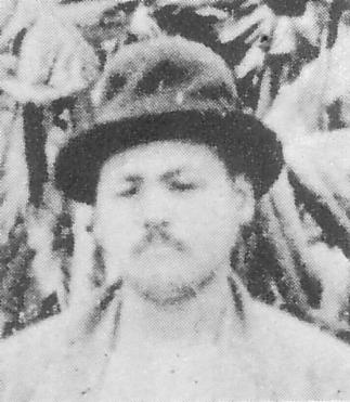 a Japanese painter ,倉田白羊（Hakuyo Kurata）